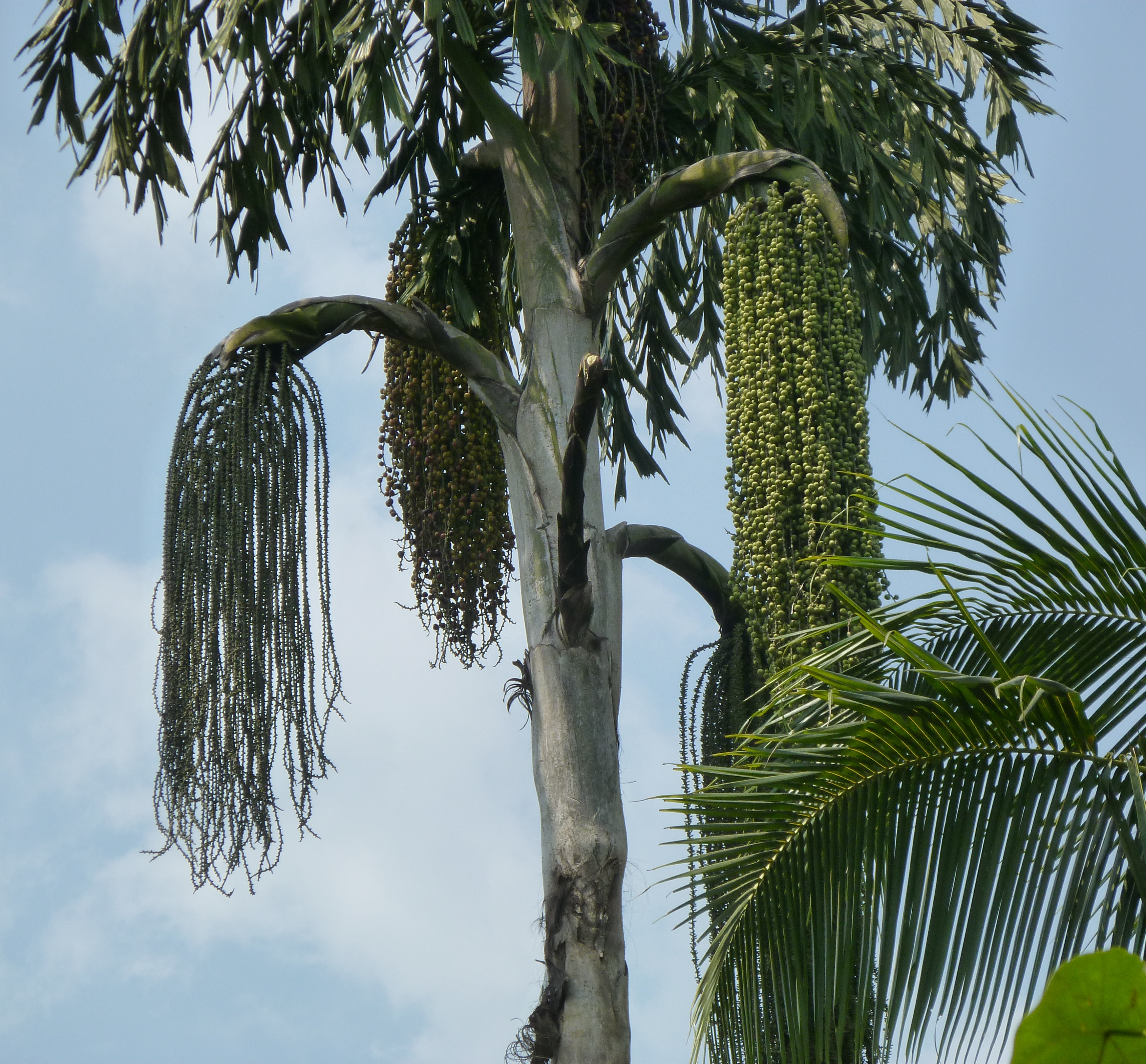 പനവർഗ്ഗത്തിൽ പെടുന്ന ഒരു വൃക്ഷമാണ് ചൂണ്ടപ്പന (ശാസ്ത്രീയനാമം:Caryota urens). കാളിപ്പന എന്നും ഈ വൃക്ഷം അറിയപ്പെടുന്നു. ഒറ്റത്തടിയായി വളരെ ഉയരത്തിൽ വളരാറുള്ള ഈ മരത്തിന്റെ ഇലകളും ഇലത്തണ്ടുകളും നാട്ടാനകളുടെ ഇഷ്ടഭോജ്യമാണ്‌. വടക്കൻ കേരളത്തിൽ ഈ പനയ്ക്ക് ആനപ്പന, ഈറമ്പന എന്നിങ്ങനെ പറയുന്നു. ഇന്ത്യൻ ഉപഭൂഖണ്ഡത്തിൽ സ്വതവേ കണ്ടുവരുന്നു.